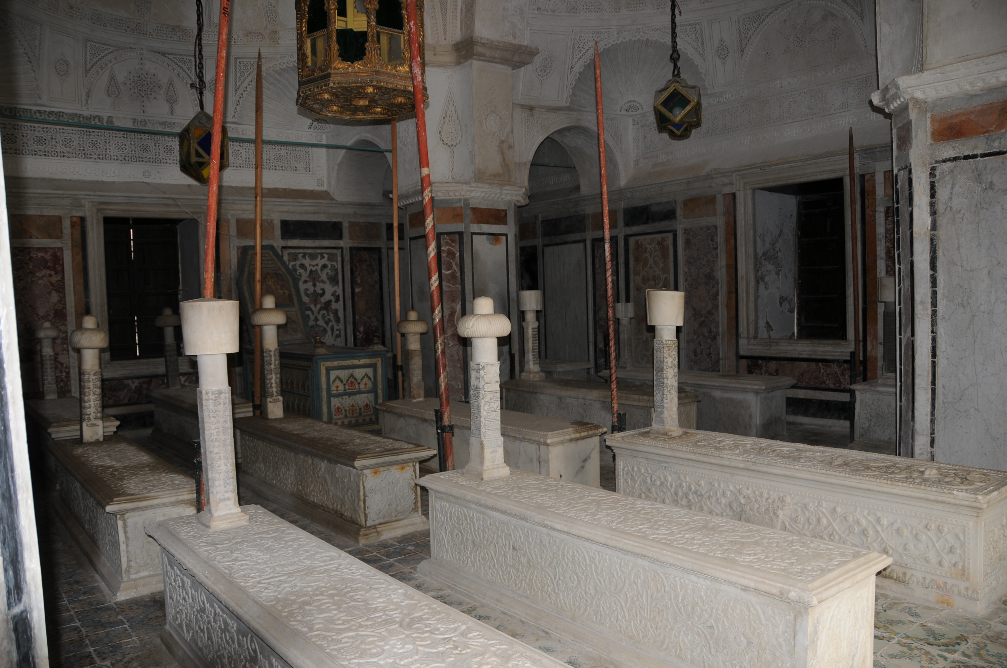 La salle des souverains (ou sont enterées les beys de la dynastie des Husseinites) à Tourbet El Bey dans la médina de Tunis